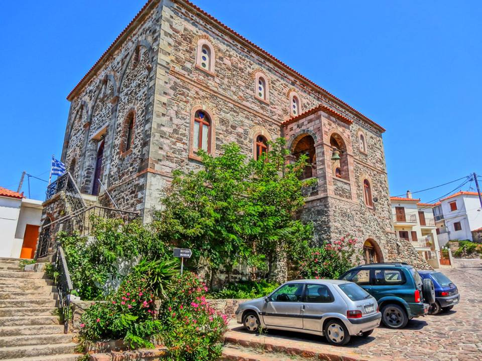 σιγρι